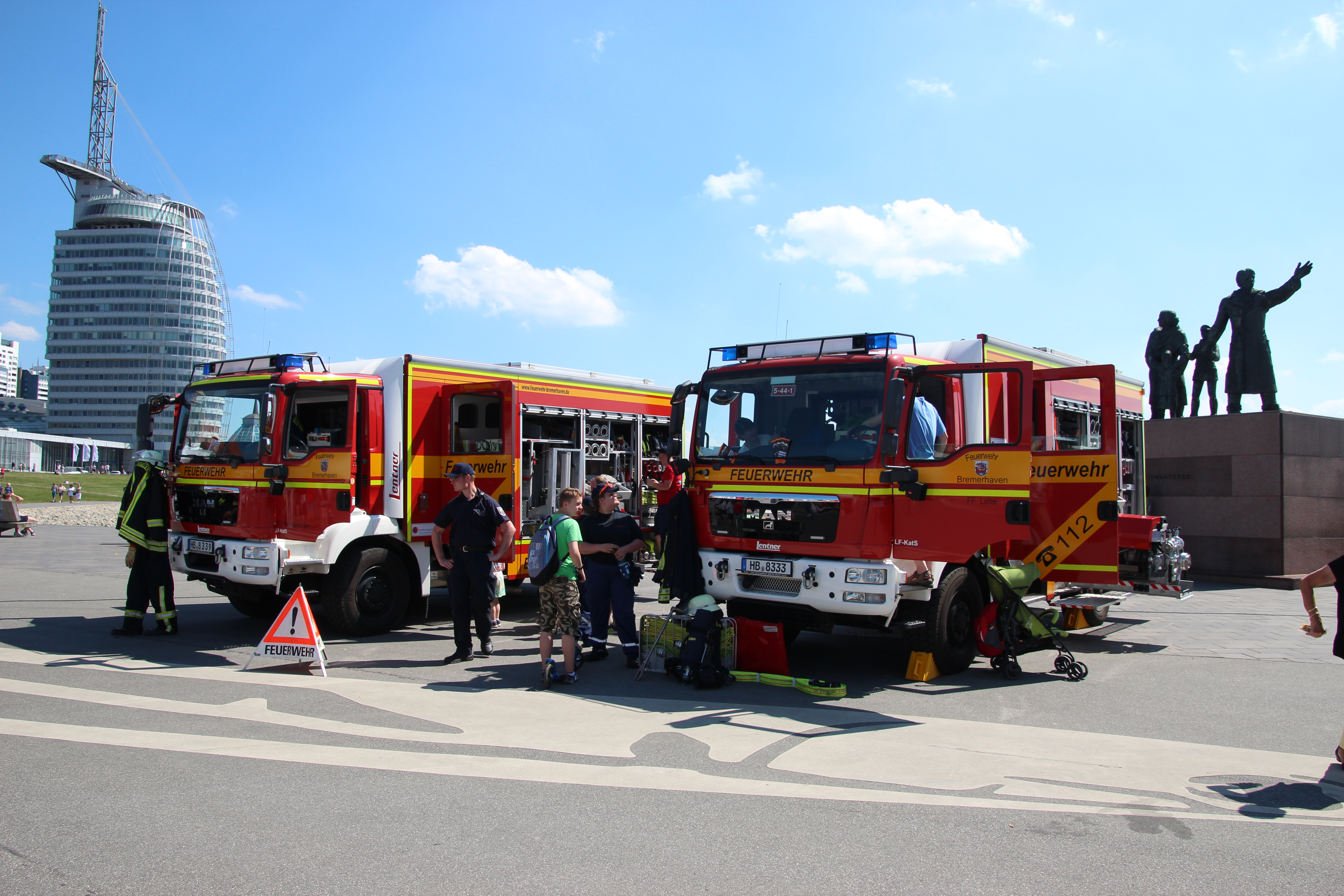 Löschfahrzeug 4-44-1 der Freiwilligen Feuerwehr Weddewarden (links) und Löschfahrzeug 5-44-1 der Freiwilligen Feuerwehr Lehe beim Seestadtfest 2018 in Bremerhaven